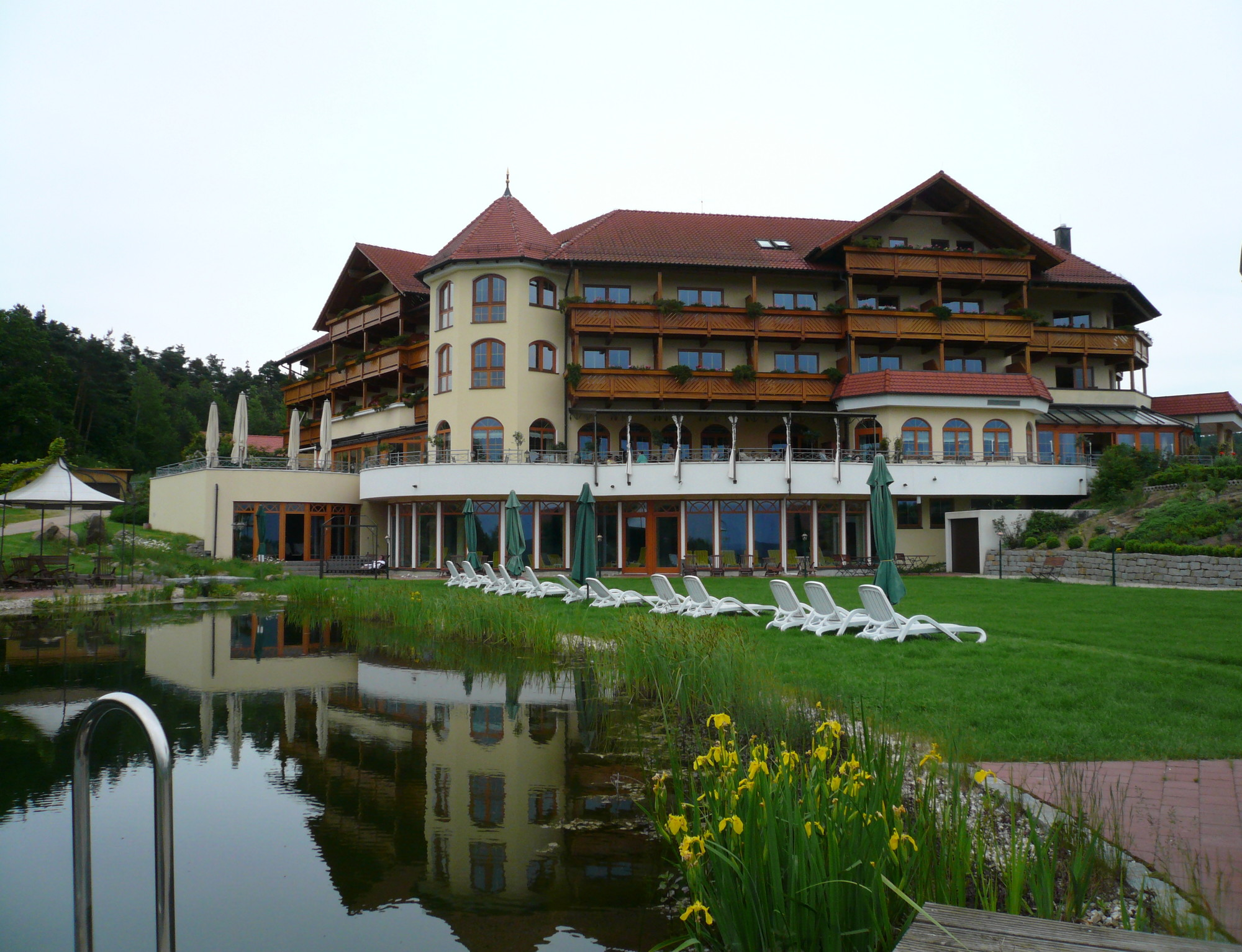 Hotel Birkenhof mit Restaurant Eisvogel in Neunburg vorm Wald, Oberpfalz